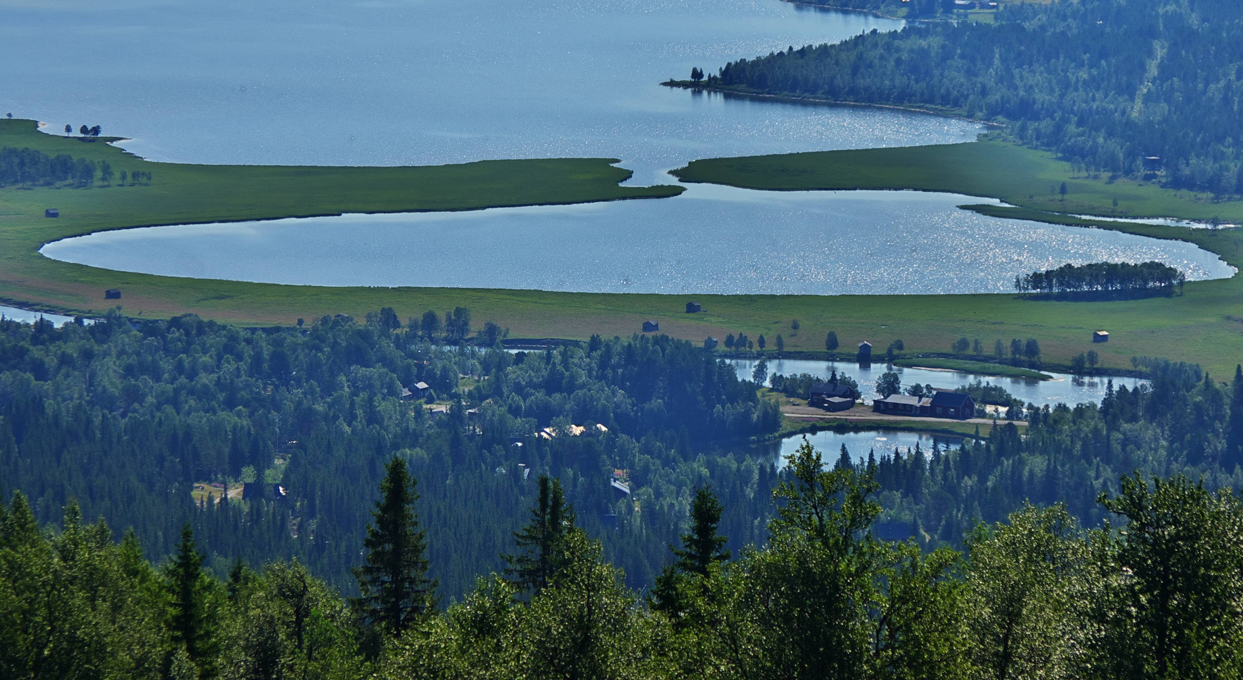 Söravan är en sjö i Sorsele kommun i Lappland. Sjön ligger i Natura 2000-området Ammarnäsdeltat.